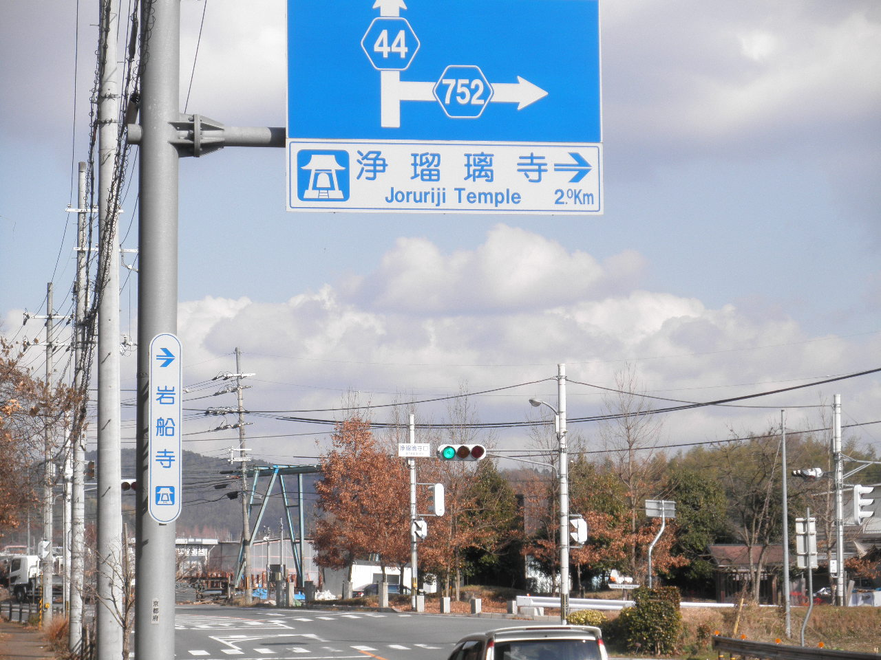 京都府木津川市加茂町高田大木屋 奈良県道・京都府道44号奈良加茂線